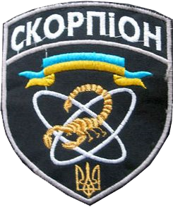 Емблема спецпідрозділу "Скорпіон" ВВ МВС України